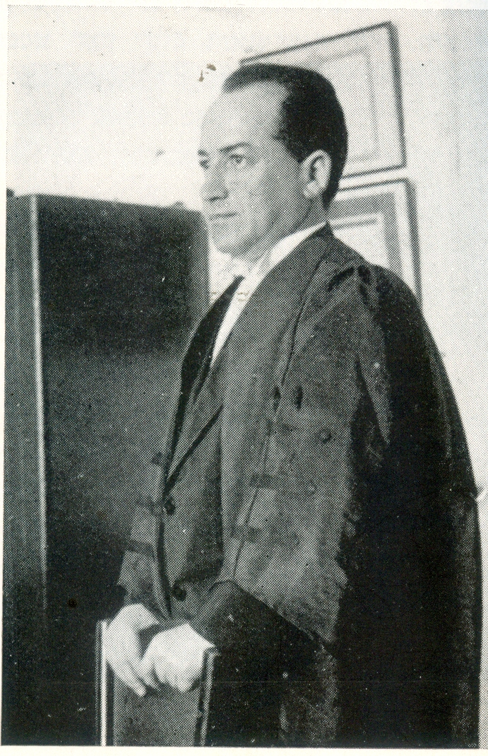 אליהו צבי כהן, משפטן ביישוב היהודי בארץ ישראל, פרקליטם של חברי ברית הבריונים